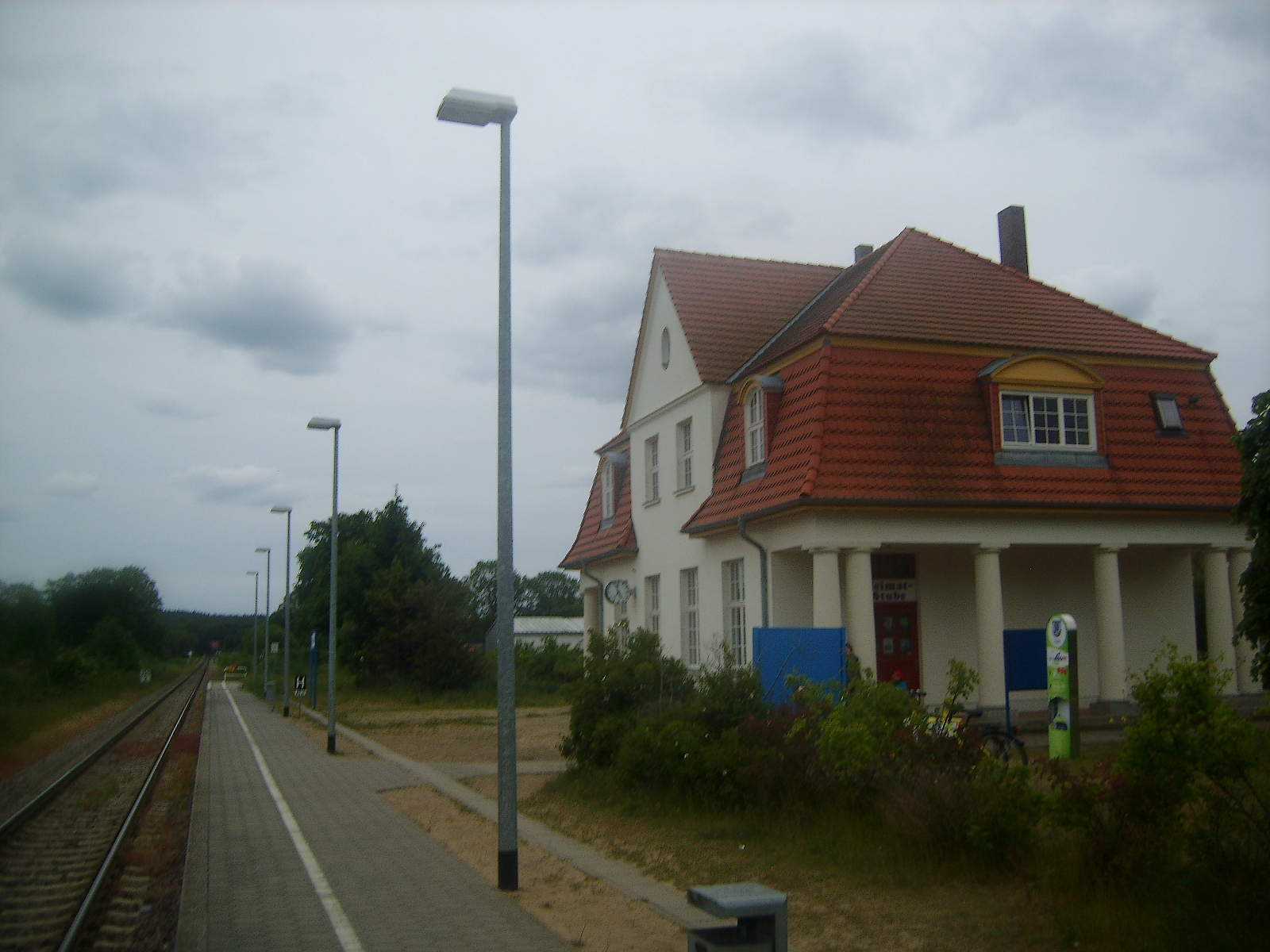 Dworzec Kölpinsee.